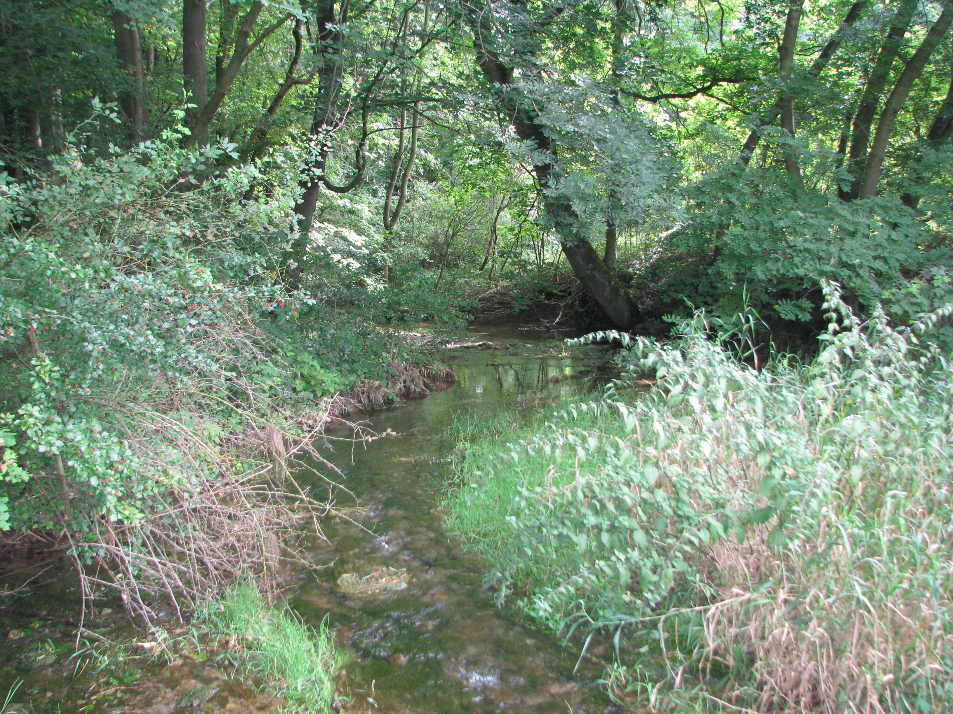 Die Helbe bei Großbrüchter (Helbedündorf) nach einem regenreichen August.